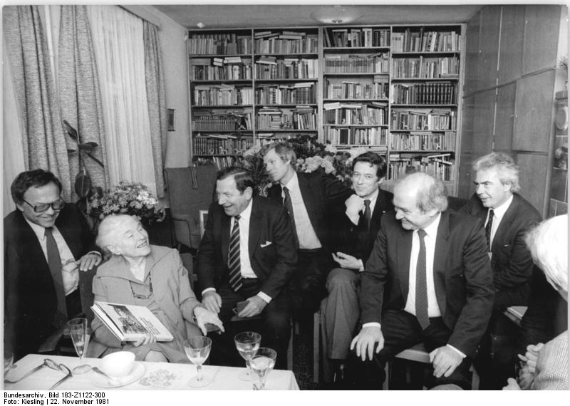 ADN-ZB Kiesling-22.11.81-BL Berlin: Anna Seghers wurde die Ehrenbürgerschaft der Stadt Mainz verliehen. Aus diesem Anlaß waren in ihrer Berliner Wohnung (v.l.n.r.) Dr. Storch (FDP), A. Seghers, Oberbürgermeister Jocke Fuchs, Wegell (FDP), Klaus Bölling, Bürgermeister Dr. Keim sowie Dr. Harder, Präsident der Gutenberg-Universität Mainz und andere Persönlichkeiten anwesend.